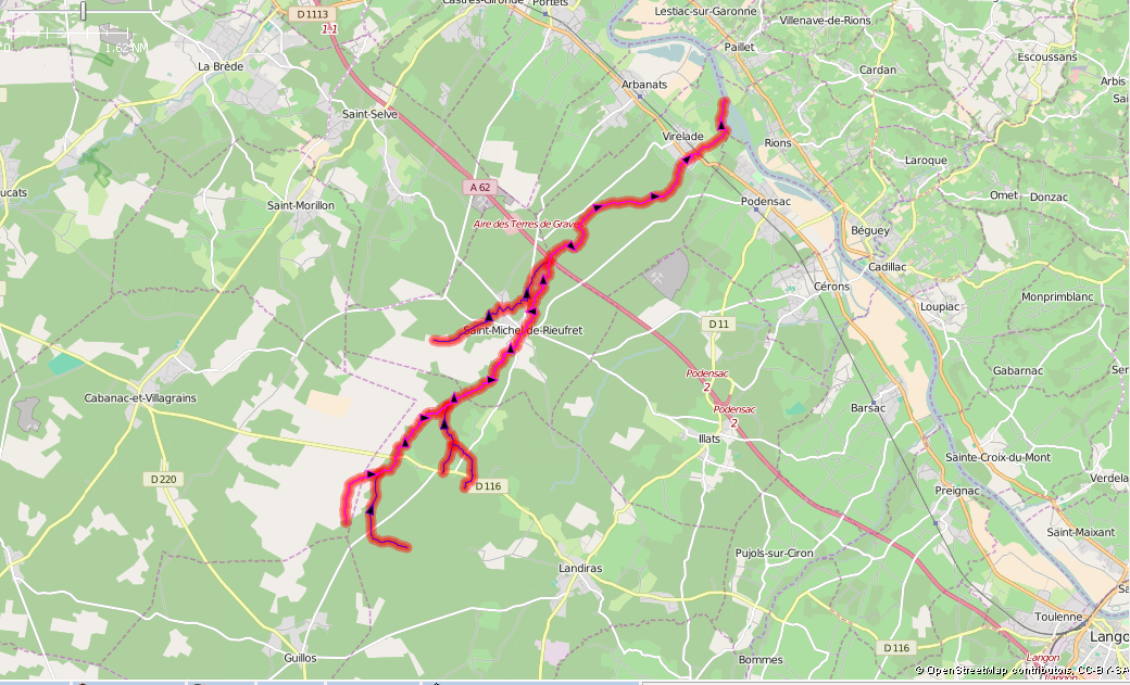 La Barboue (affluents) This map may be incomplete, and may contain errors. Don't rely solely on it for navigation.